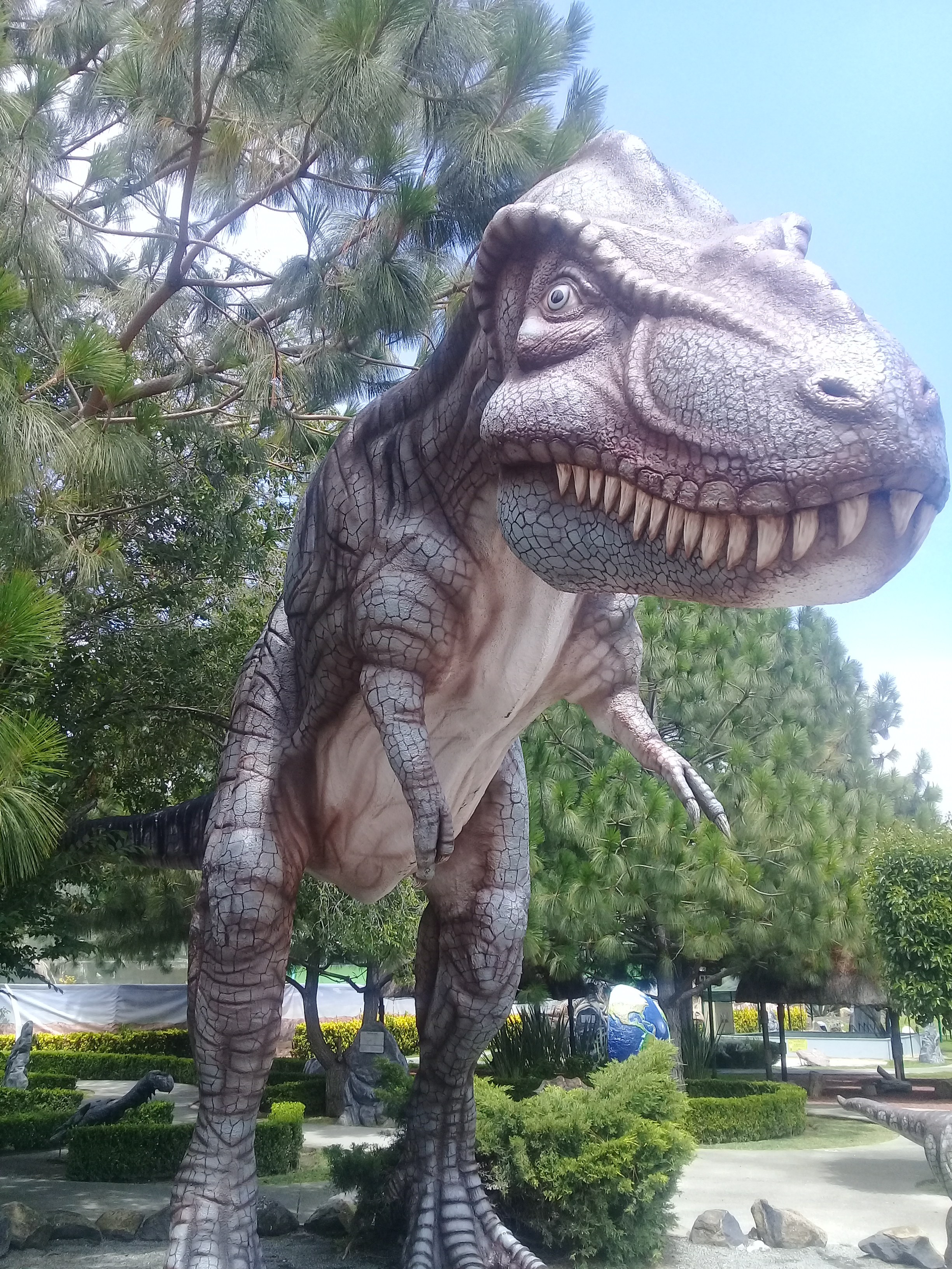 El Dinoparque, inaugurado el 23 de noviembre de 2009 en esta área de 9000 m2, se encuentran cuarenta y dos especies representadas y treinta fósiles, está dividido en tres etapas cretácico, jurásico y triásico. Con más de 40 figuras en tamaño real de los dinosaurios que habitaron nuestro planeta hace 60 millones de años.